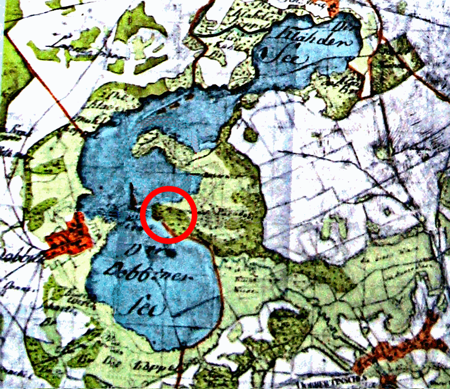 Ehemaliger See "Dobbiner See"